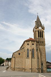 Eglise Saint Martin Cour et buis